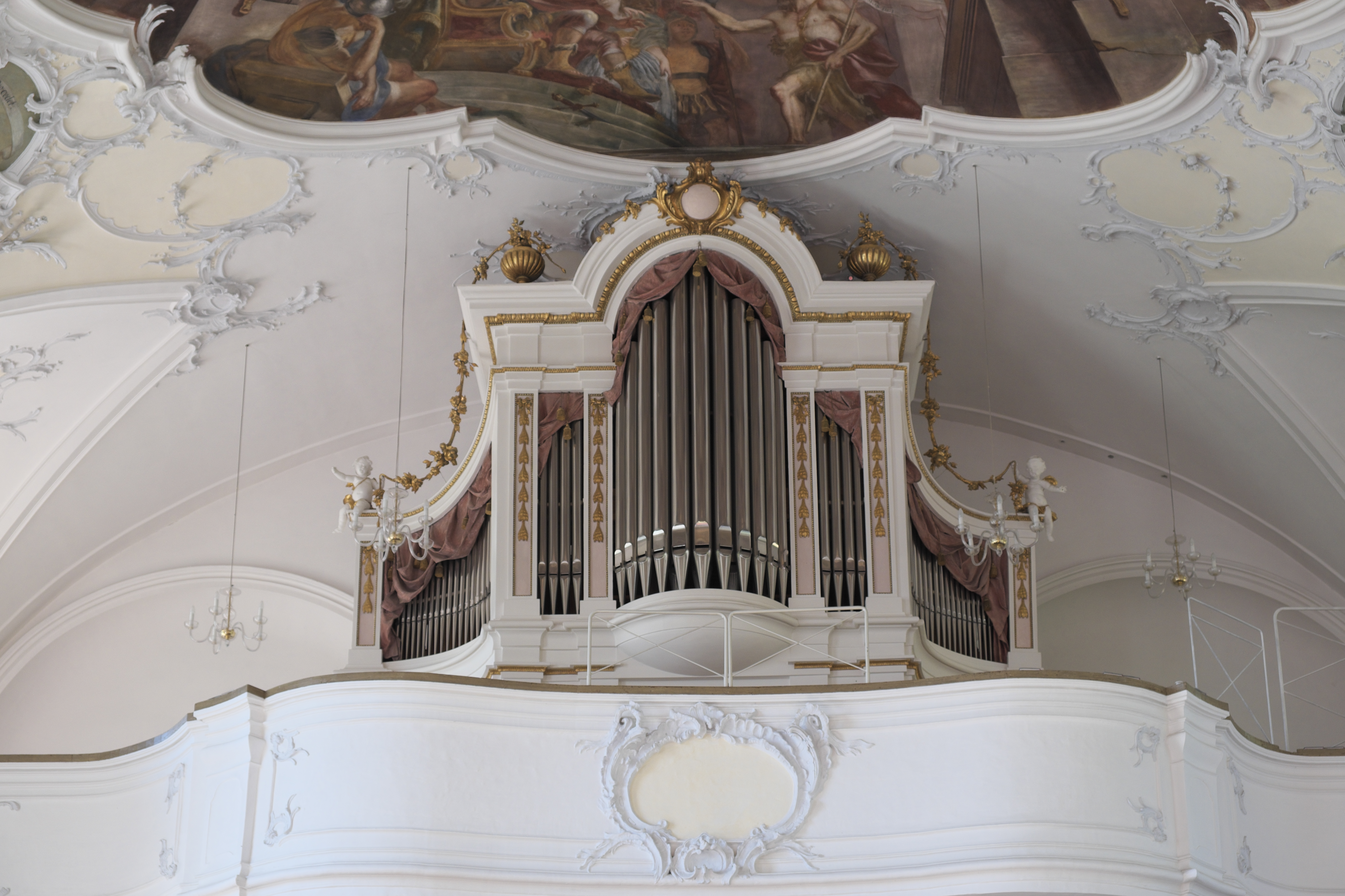 Katholische Pfarrkirche St. Johannes Baptist in Wessobrunn im Landkreis Weilheim-Schongau (Bayern/Deutschland), Orgel